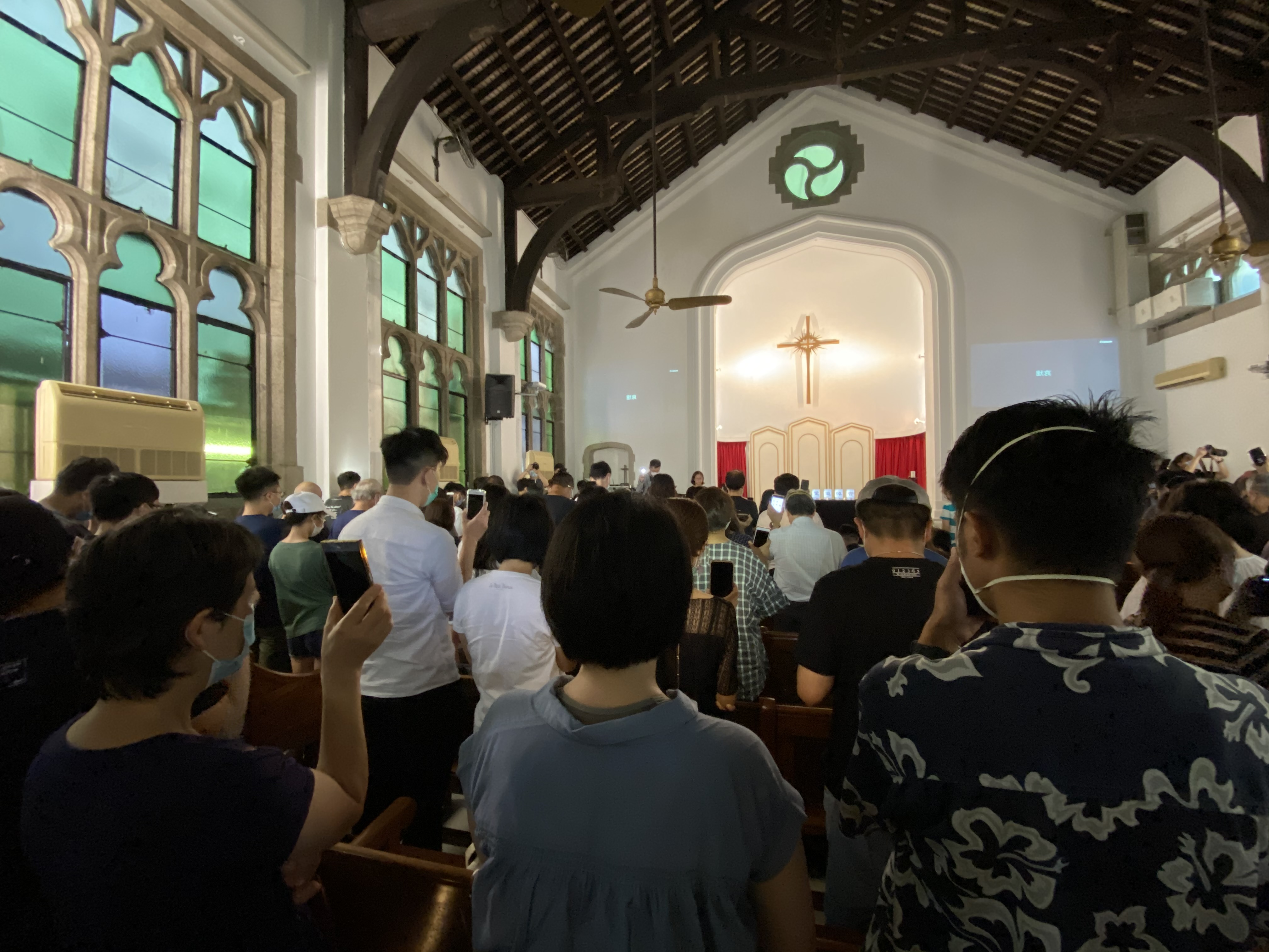 香港基督教团体6月28日举办追悼会，悼念2017年以来自杀及怀疑被自杀的社运死者，大会估计有超过200人参与。